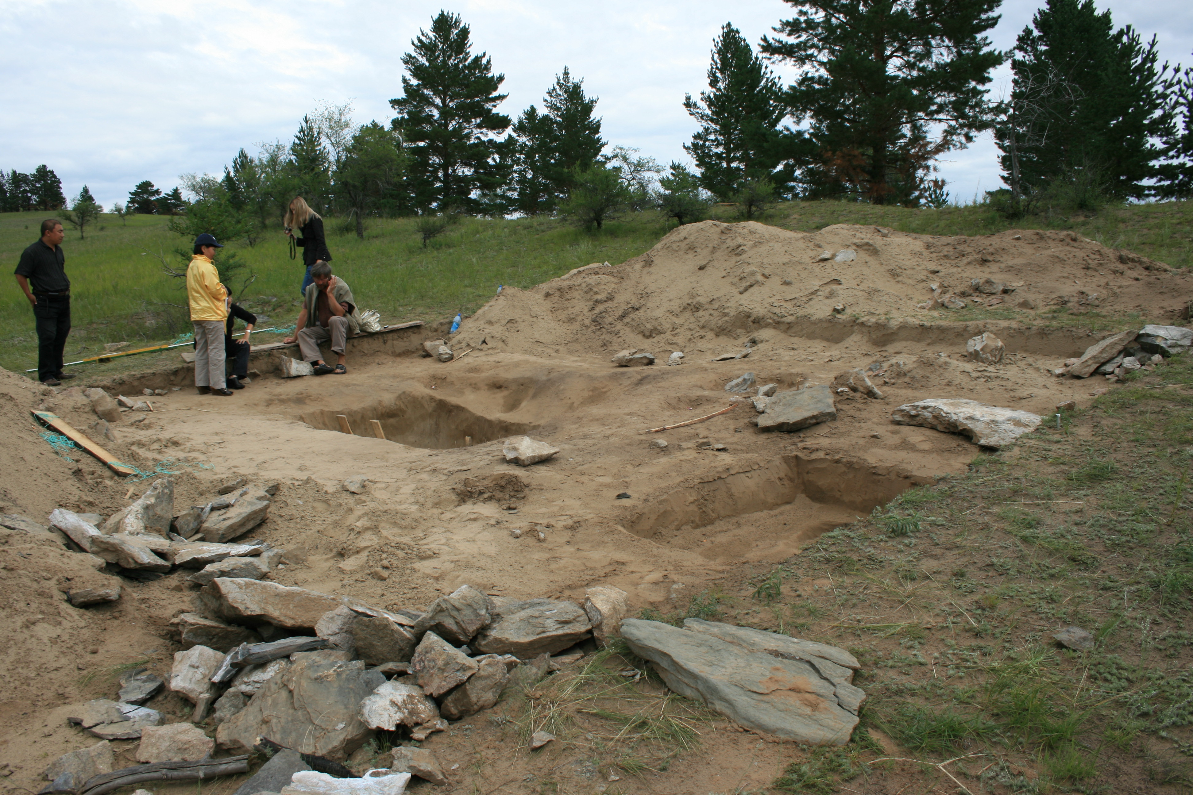 Раскопки гуннского могильника Оргойтон ведут археологи Государственного Эрмитажа и Кяхтинского краеведческого музея. Руководитель экспедиции - С.С. Миняев.